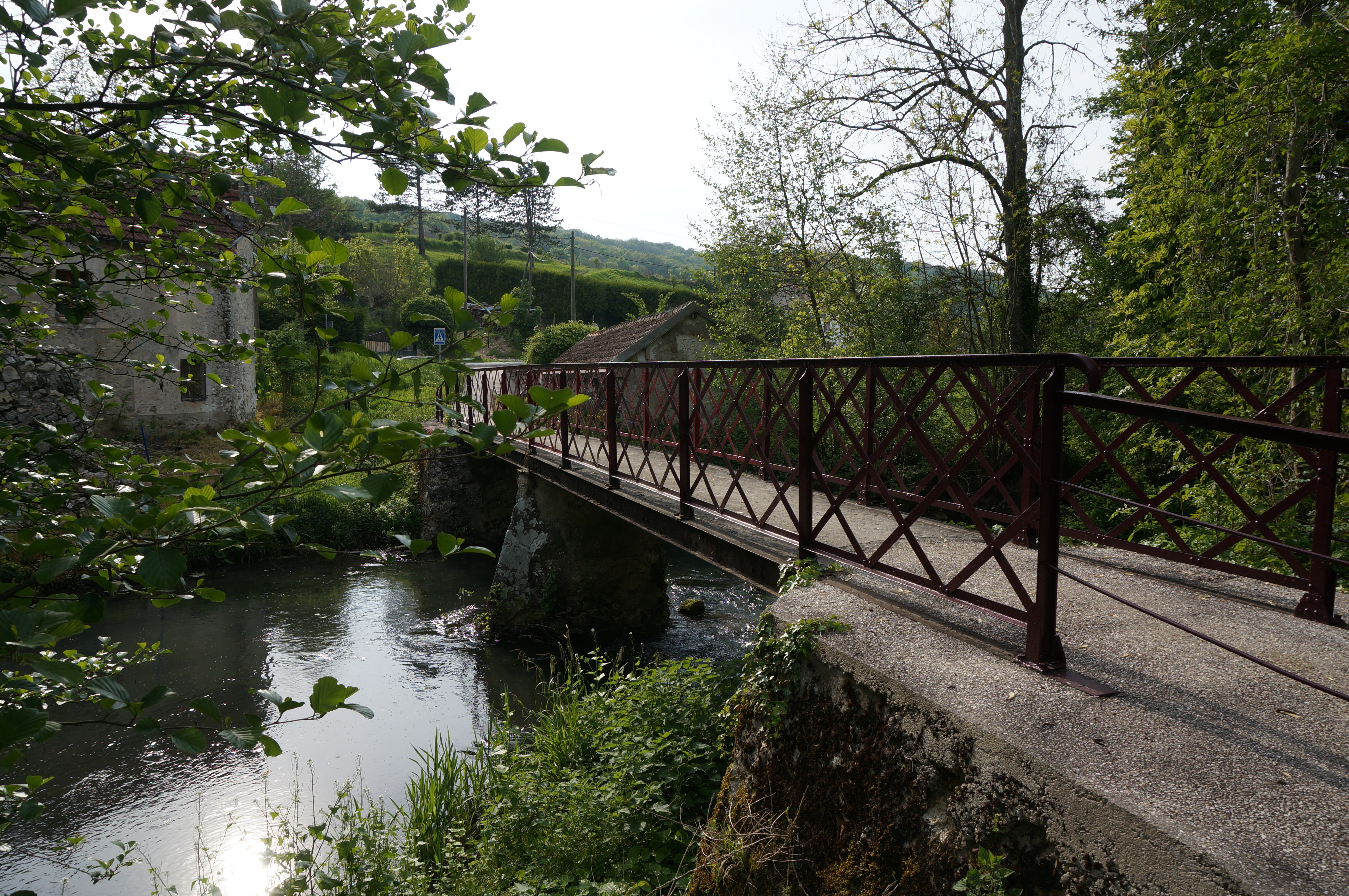 à Baulne-en-Brie.